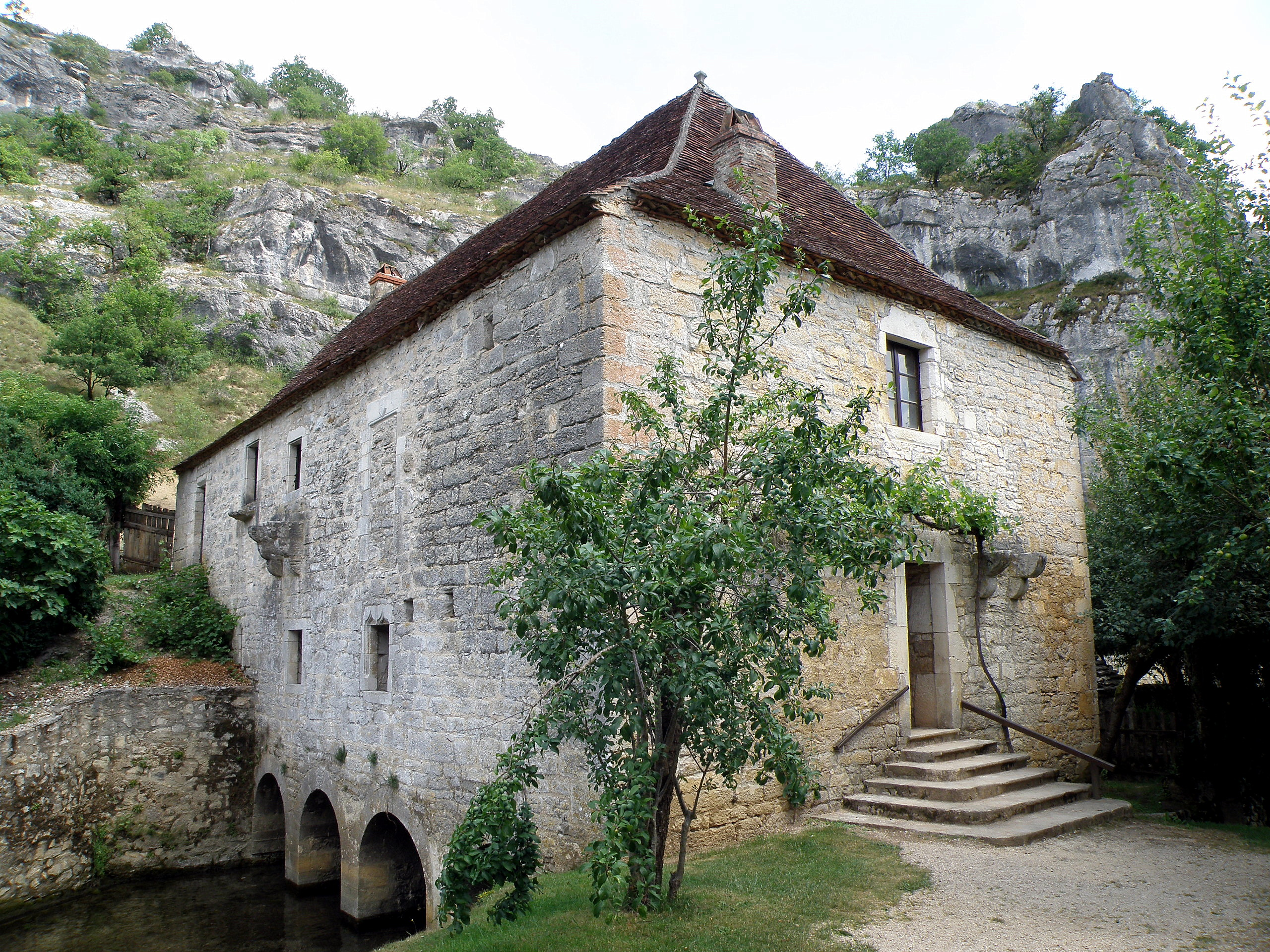 Calès, commune du département du Lot (région Midi-Pyrénées, France). Moulin à eau de Cougnaguet (ou de Cognaguet ― selon la Base Mérimée ― ou de Caugnaguet ― graphie retenue par l’IGN), sis sur la rive droite de la rivière Ouysse, affluent gauche de la Dordogne. Façade nord (à gauche) et ouest (à droite, avec vestiges de bretèche défensive) du moulin ; bief de fuite (en bas à gauche).